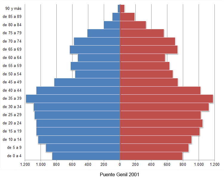 Pirámide de población de Puente Genil en el año 2001